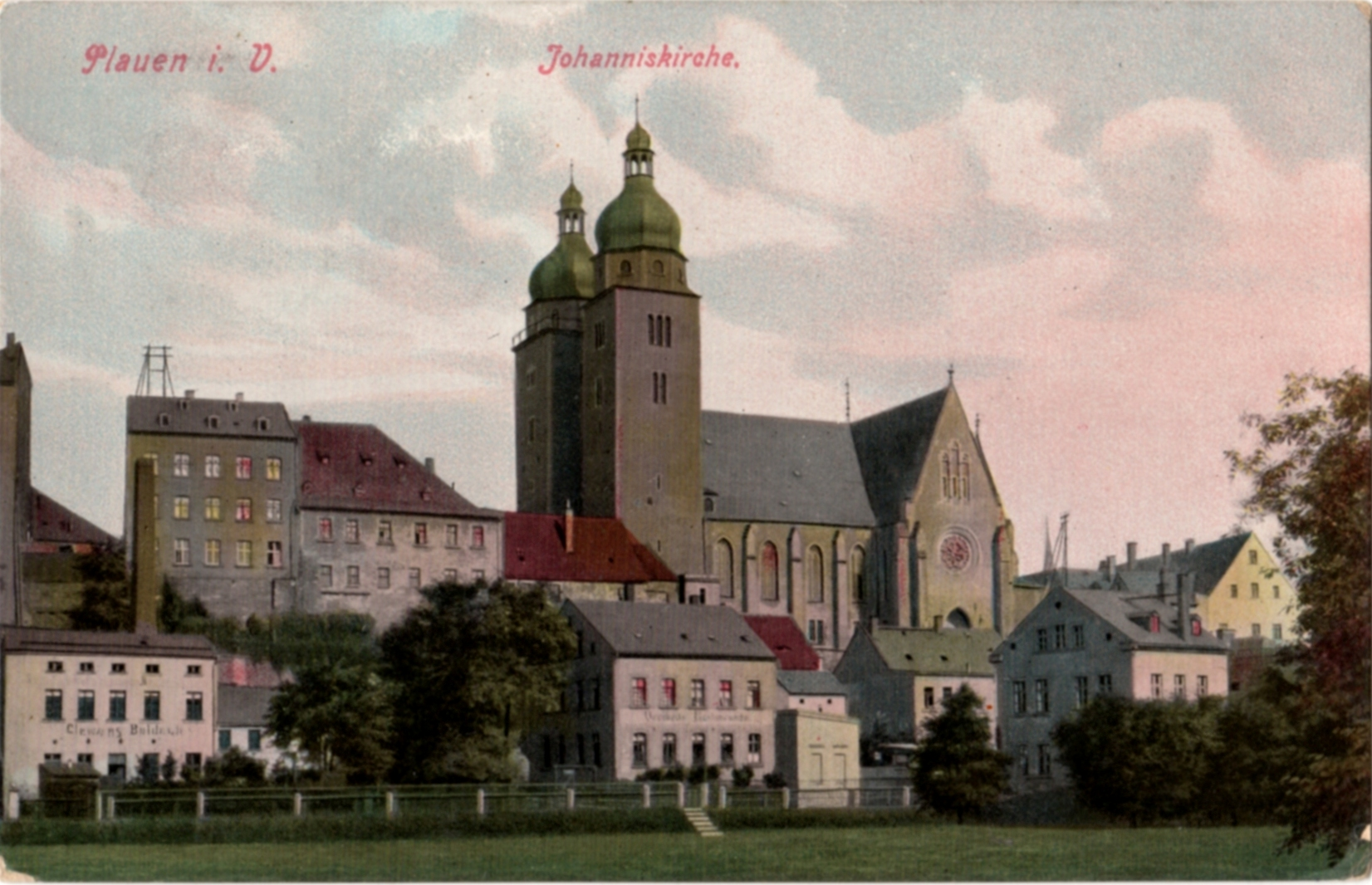 Ansichtskarte aus Plauen mit Blick auf die Johanniskirche von Südwesten. Karte gelaufen 1908.